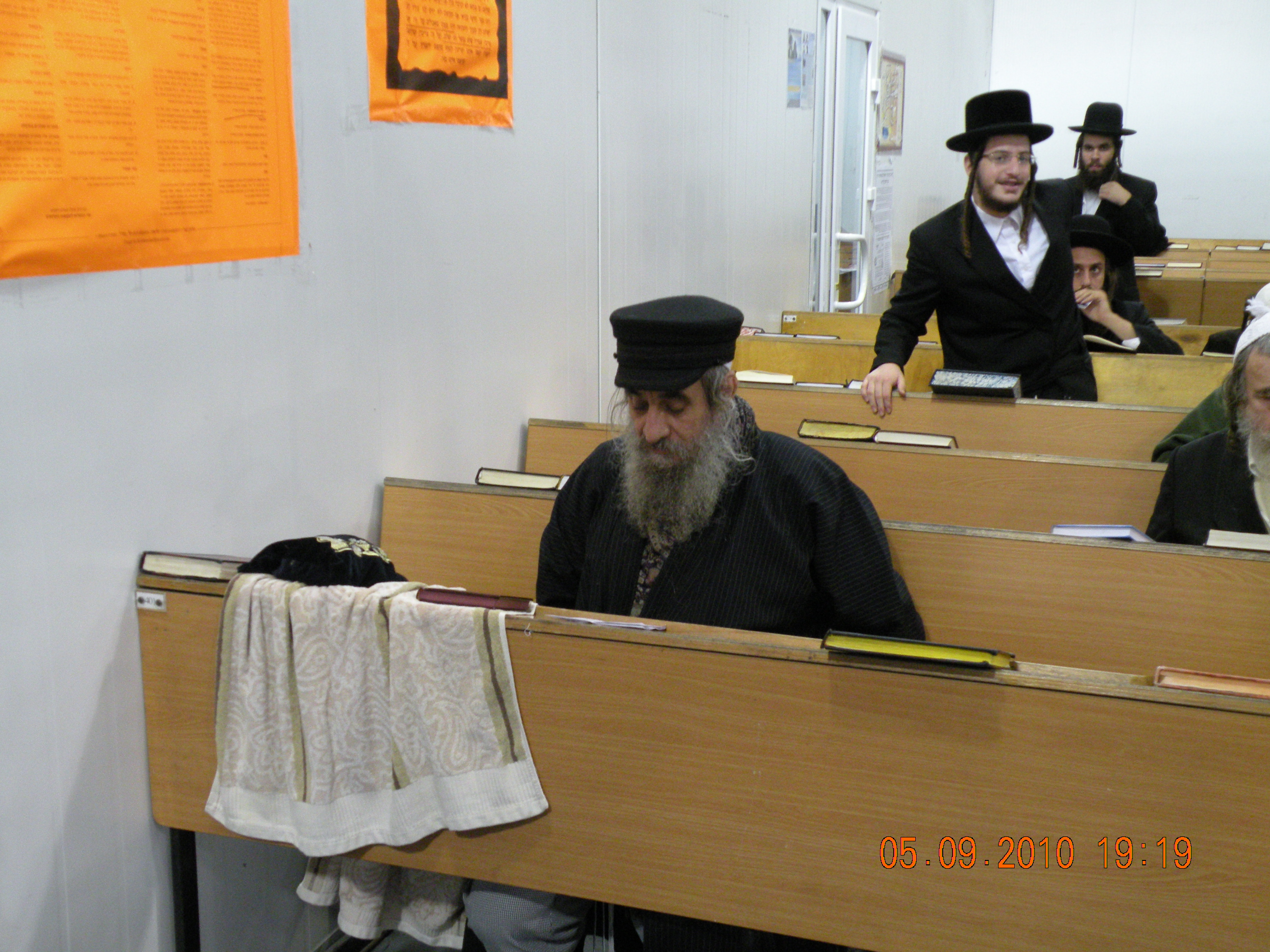 ר' ישראל יצחק בזאנסון במתחם החיצוני של הציון הקדוש של רבי נחמן באומן